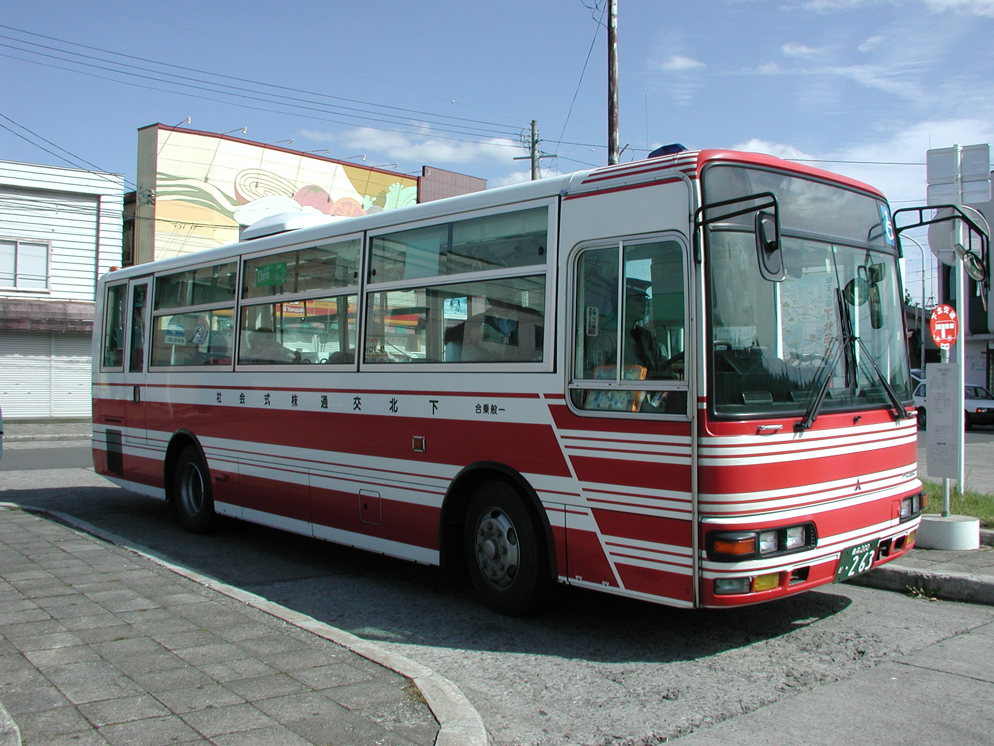 下北交通一般路線塗装（三菱ふそう・エアロミディMK：KK-MK23HH） 野辺地駅にて